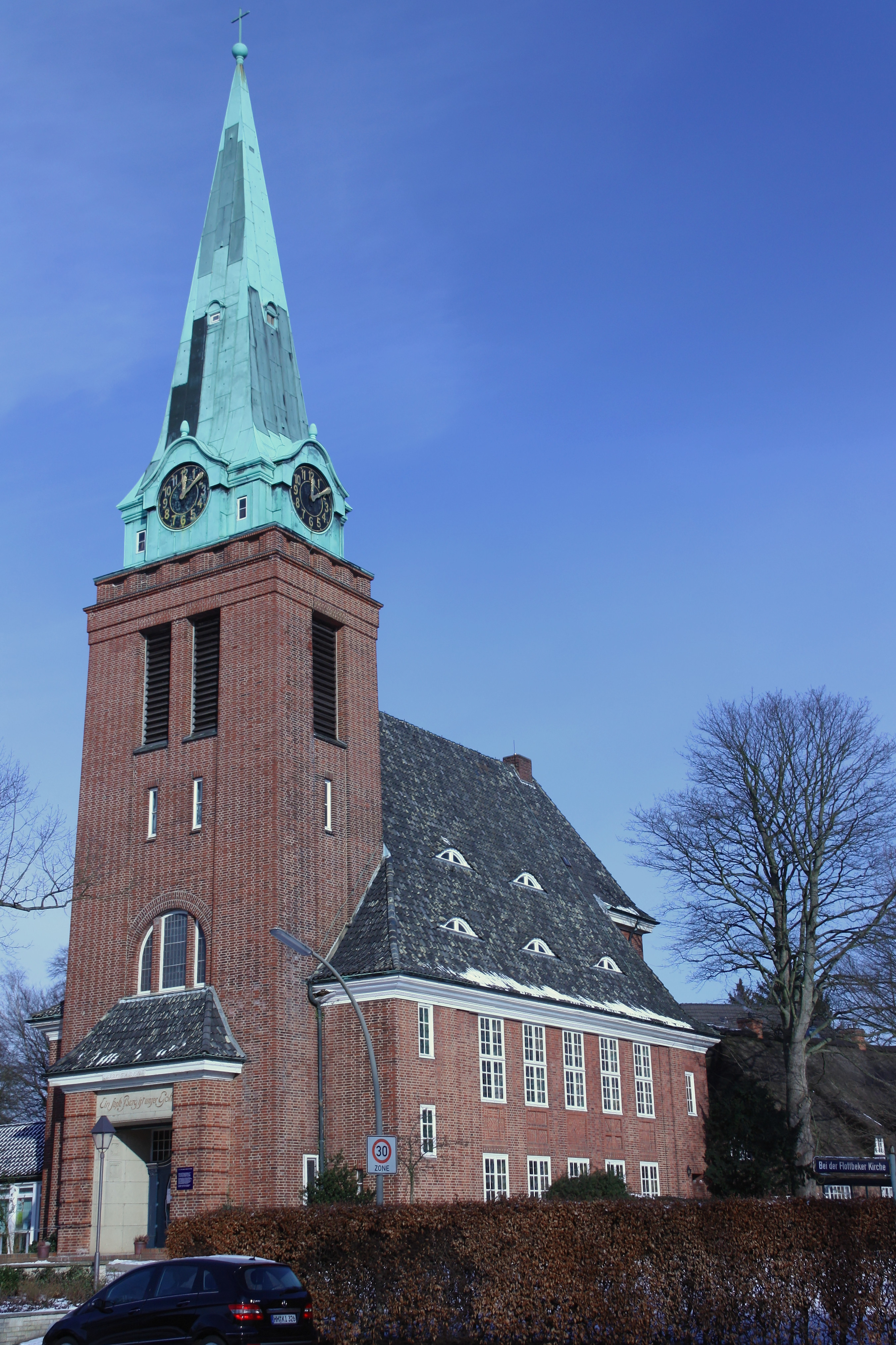 Hamburg, Groß Flottbeker Kirche